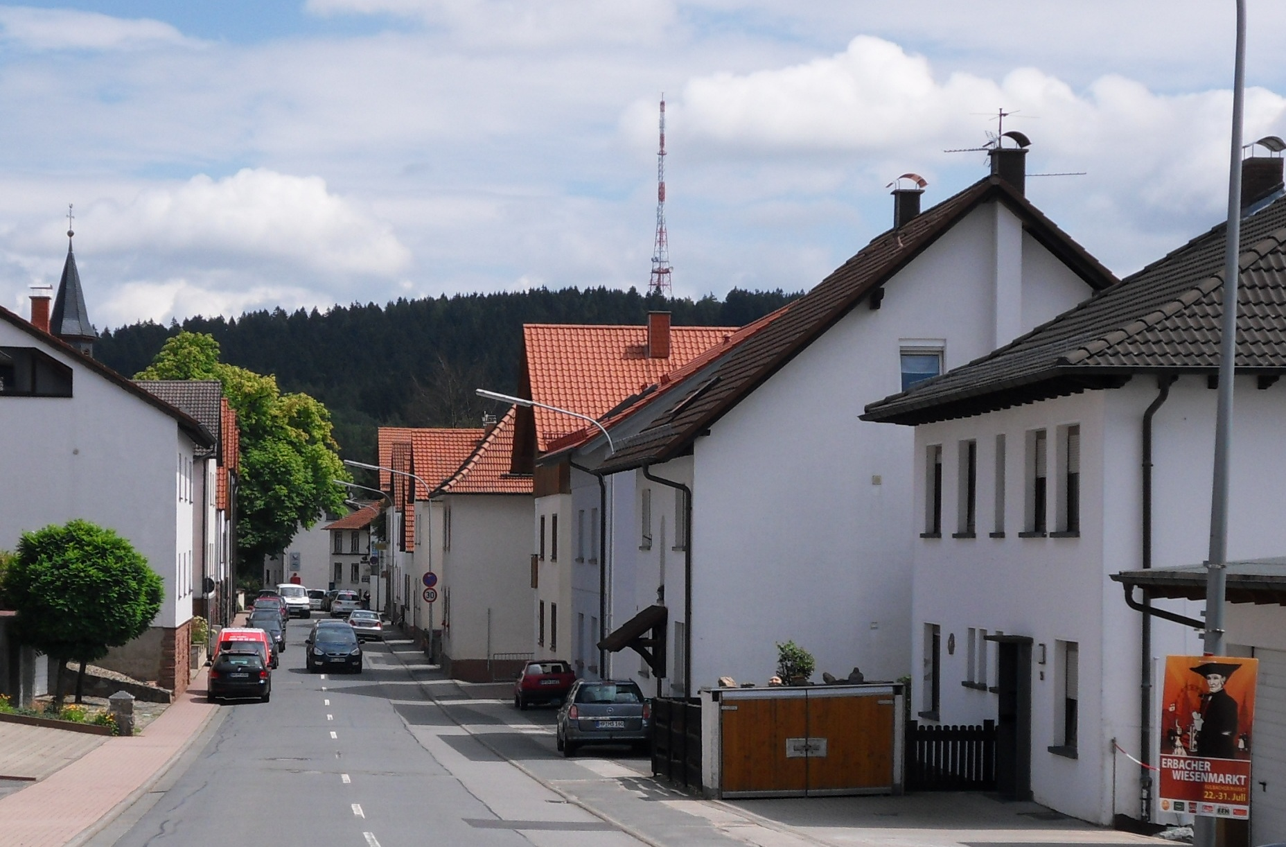 Blick durch die Löhrbacher Straße des hoch gelegenen Ober-Abtsteinach (480 m) im Odenwald zum Gipfel des rund 1,5 km entfernten Hardbergs (593 m) mit dem 135 m hohen Sendeturm des Hessischen Rundfunks